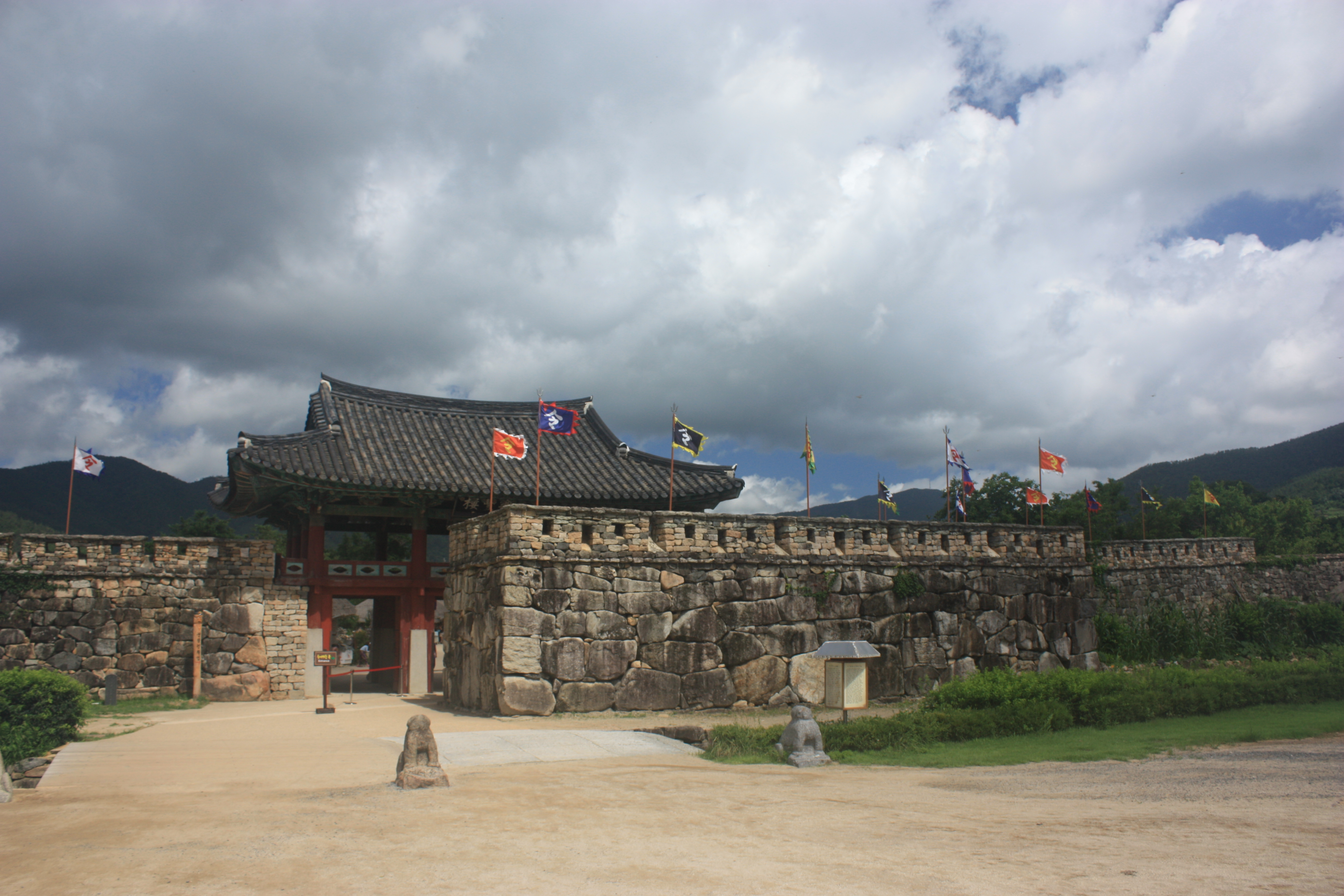 Naganeupseong, Jeollanamdo, South Korea